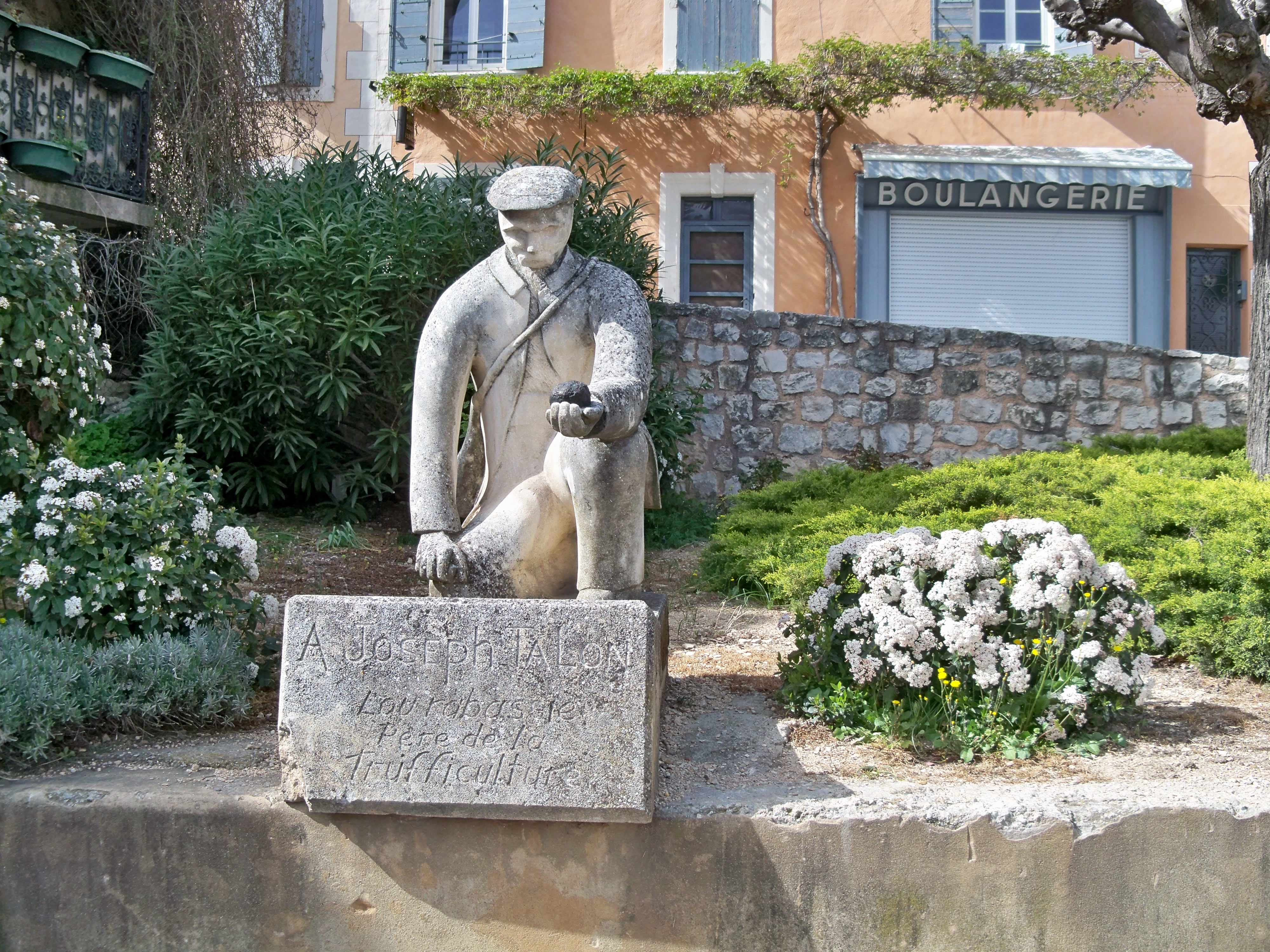 Joseph Talon, Rabassier à Saint Saturnin lès Apt, Vaucluse, France